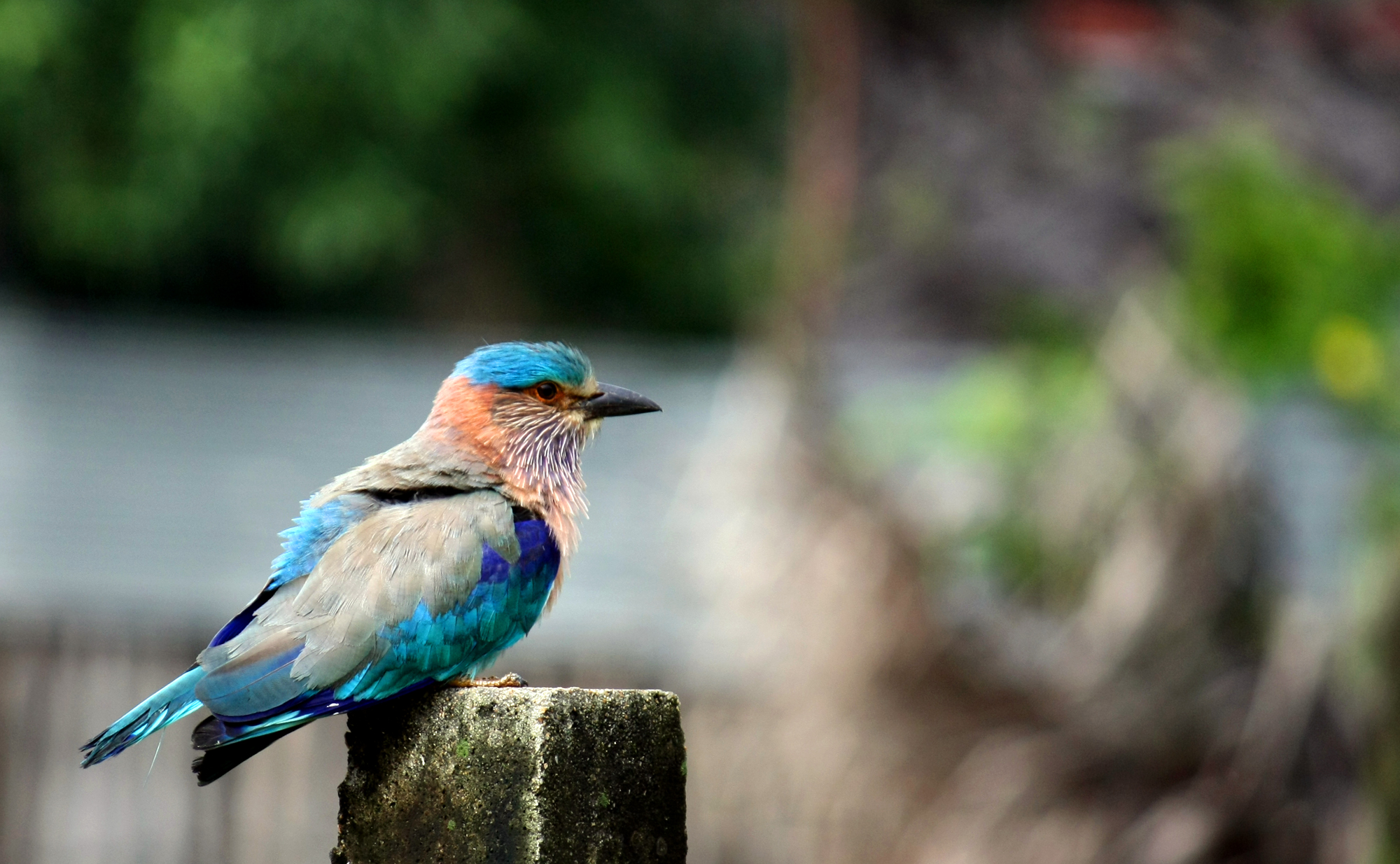 பனங்காடை - தமிழ்நாட்டில்/ இலங்கையில் காணப்படும் பறவைகள்